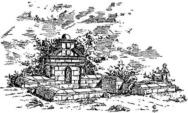 La fontaine de Gouesnou (Charles Chaussepied, Bulletin de la Société archéologique du Finistère, 1915)